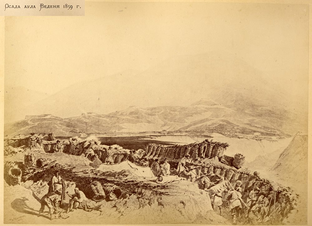 Теодор Горшельт. Осада аула Веденя 1859 г.